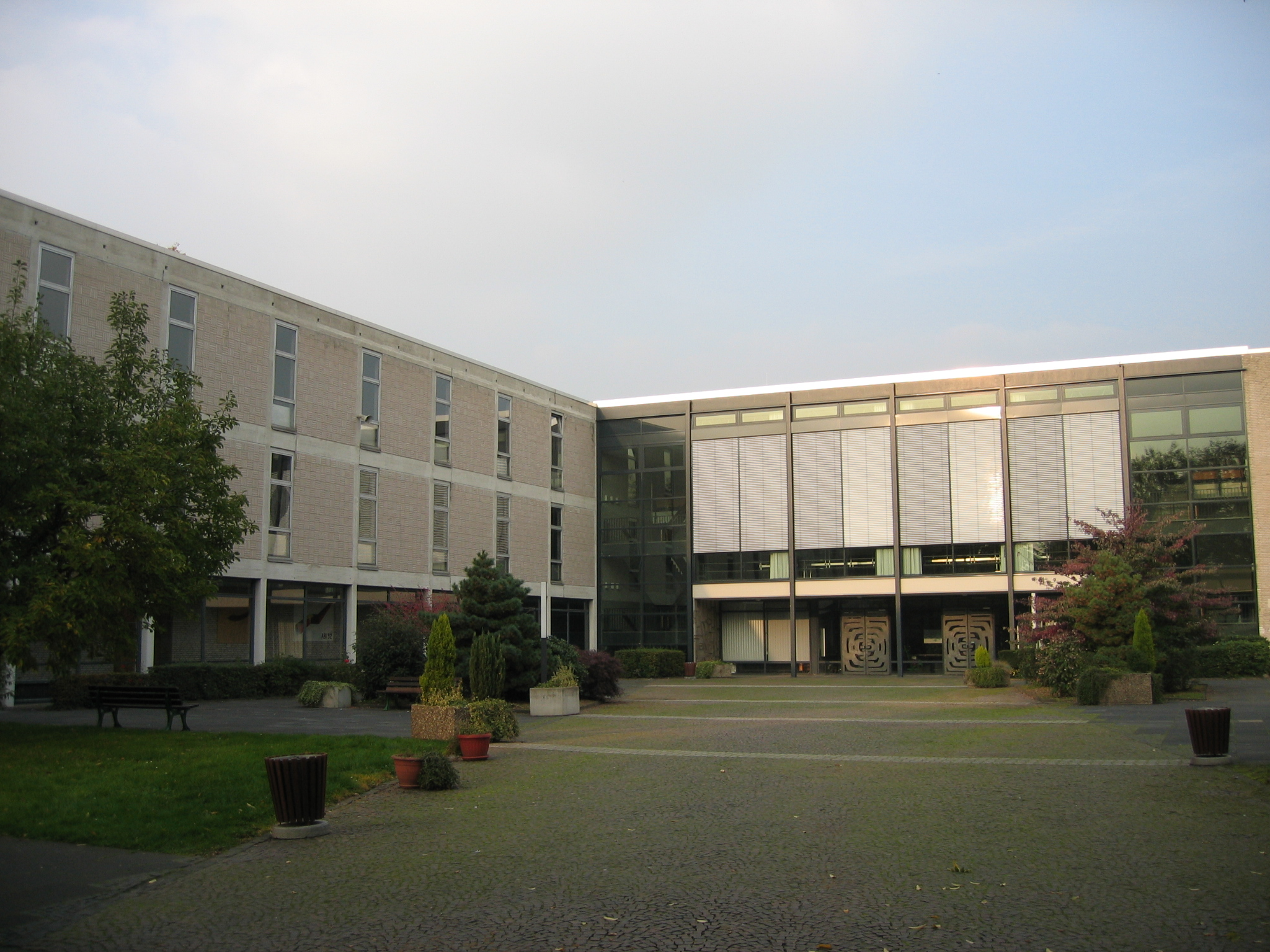 Helmholtz-Gymnasium Bonn